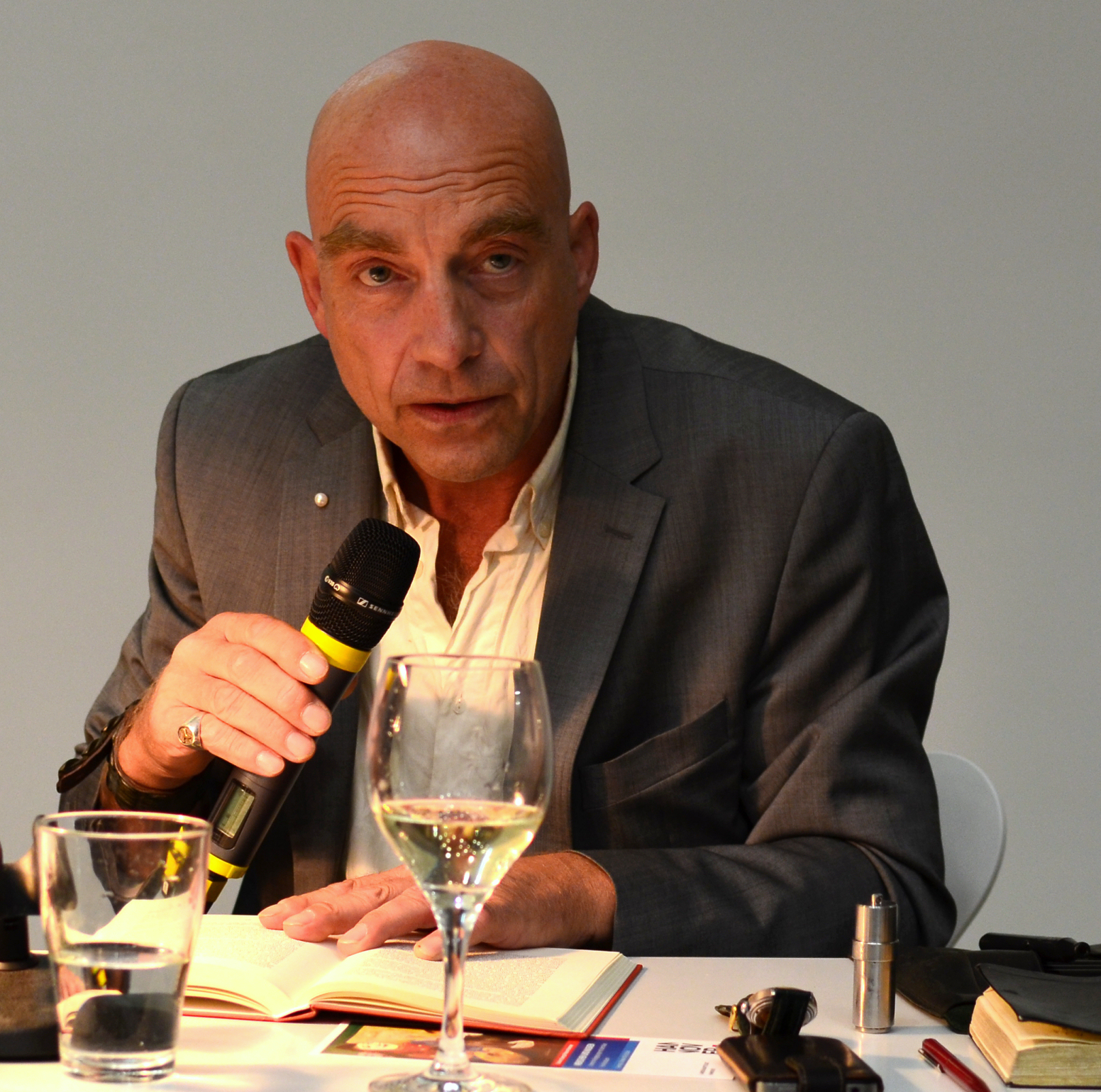 Alban Nikolai Herbst bei einer Lesung im Sprengelmuseum